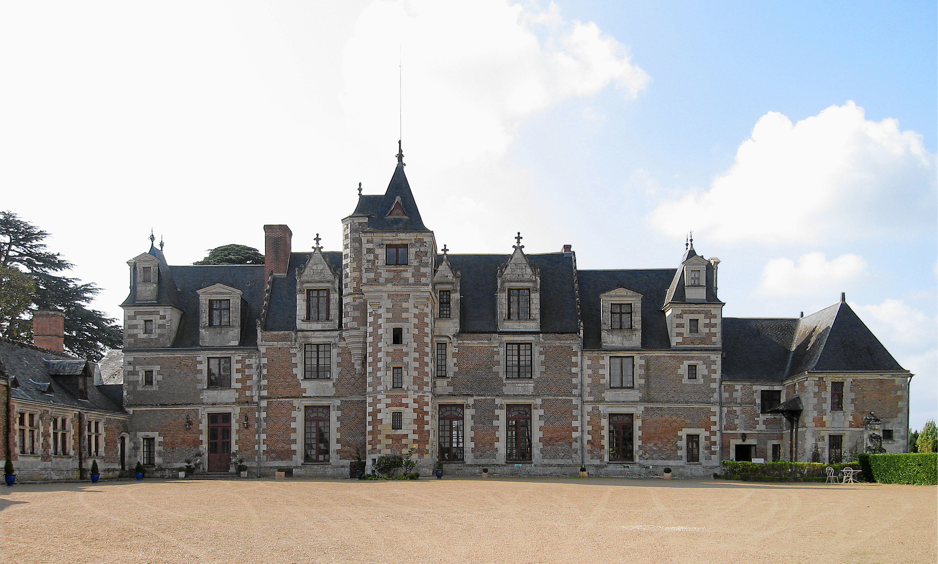 Hauptgebäude des Schlosses Jallanges in Vernou-sur-Brenne